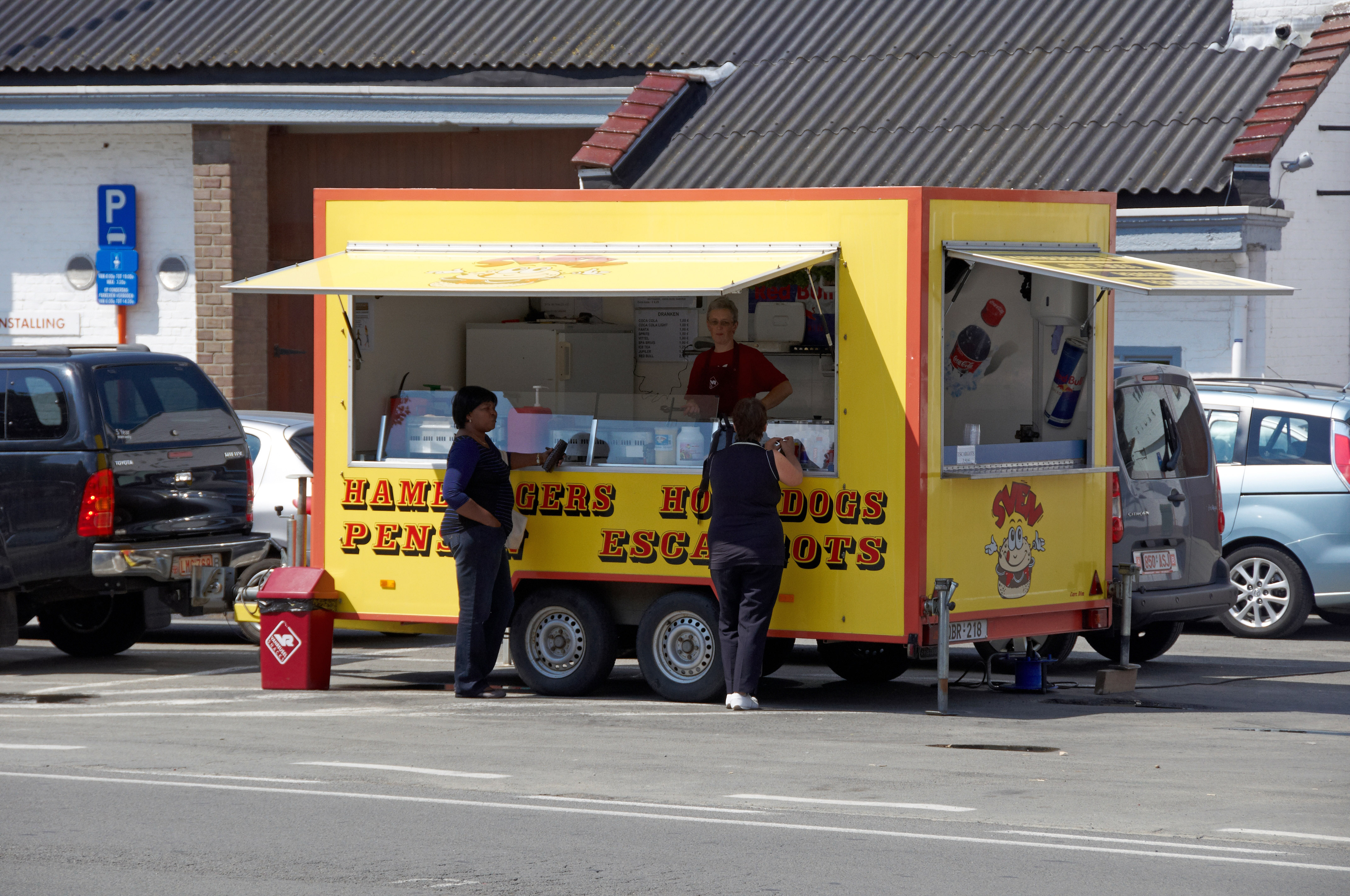 Une friterie mobile en Overijse